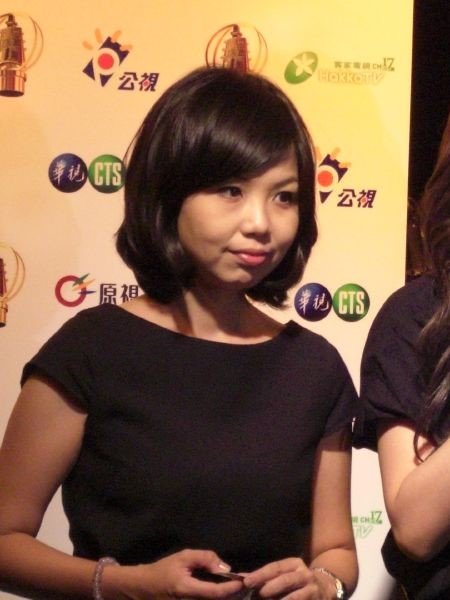 第43屆金鐘獎台灣公共廣播電視集團慶功宴，電視金鐘獎戲劇節目導演（播）獎及迷你劇集編劇獎得獎者陳慧翎。